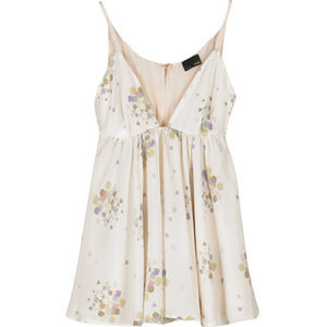 fendi - printed silk camisole